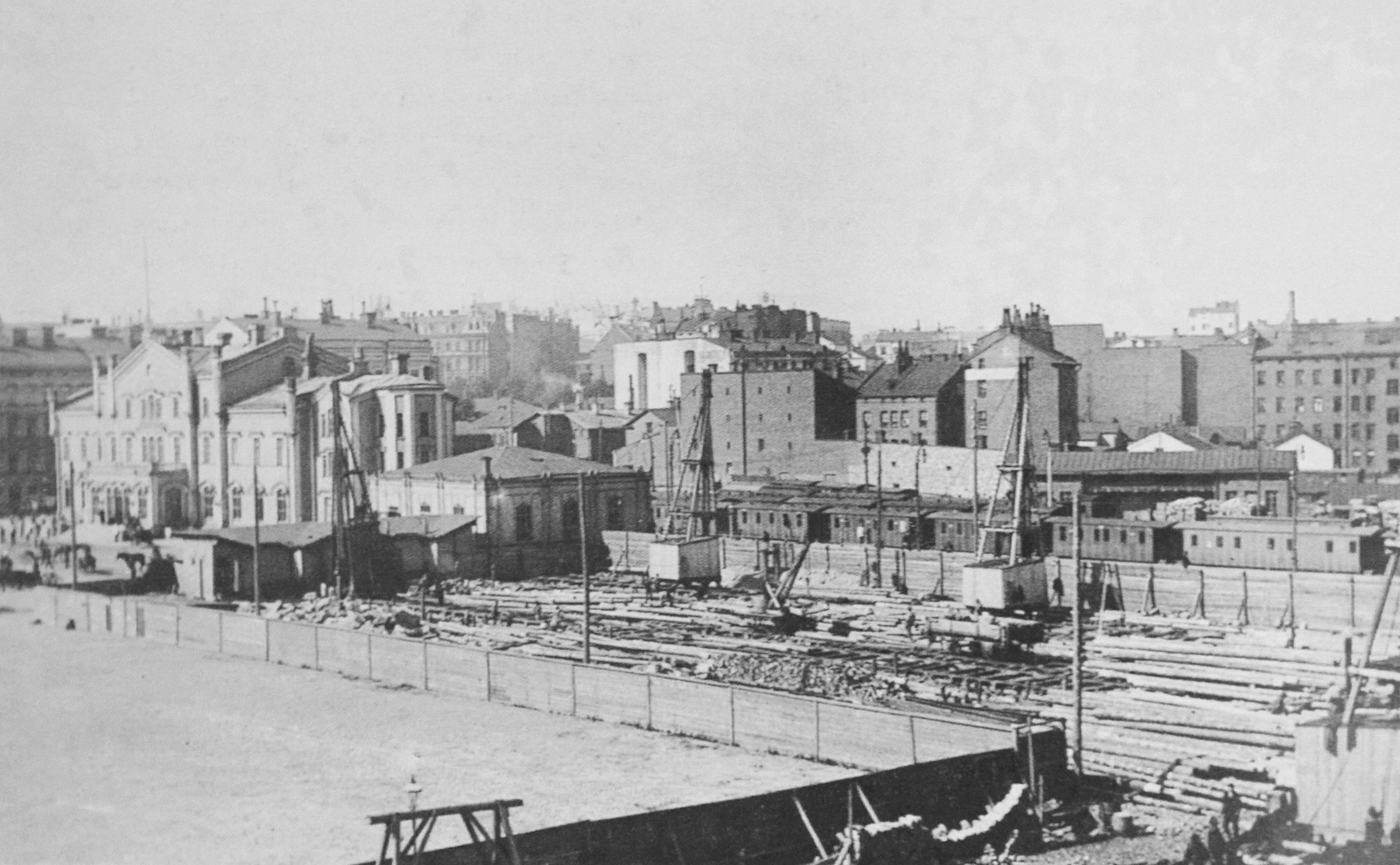 Helsingin rautatieaseman hallintorakennuksen paalutustyöt vuonna 1906.